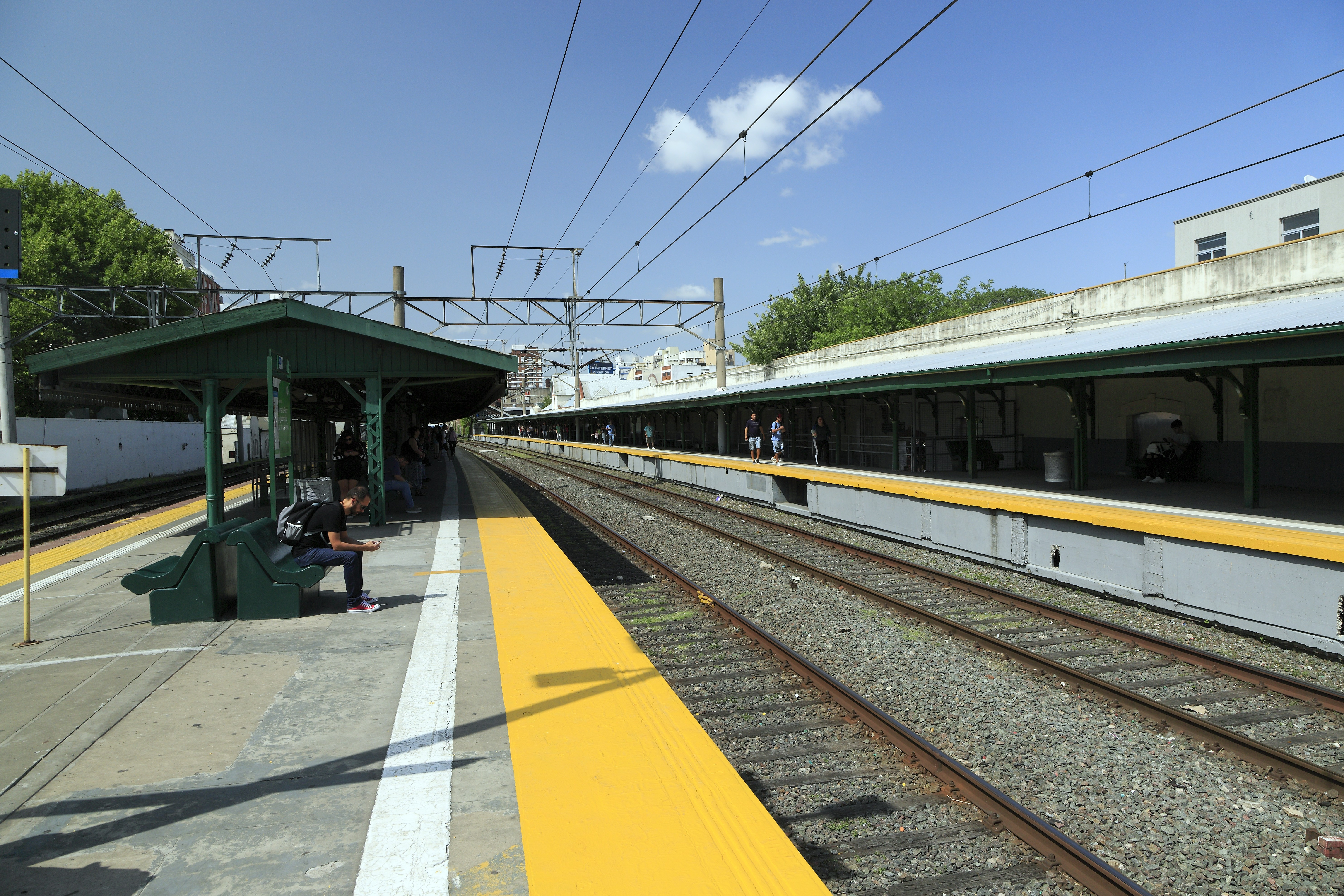 Der Haltepunkt ist ein klassischer Hp einer dichtbelegten Vorortstrecke. Die an allen Zugangsstellen haltenden Züge verkehren auf den Gleisen rechts, die auf den linken Gleisen verkehrenden Züge bedienen diesen Haltepunkt nicht. Deshalb wurde der Außenbahnsteig ganz links nicht mit erhöht. Durch die bei etwa 1150 mm liegenden Bahnsteigoberflächen wirken die nicht mit umgebauten Dächer etwas gedrungen. Die Höhe unter den Dächern ist trotzdem noch ausreichend. Richtung Süden